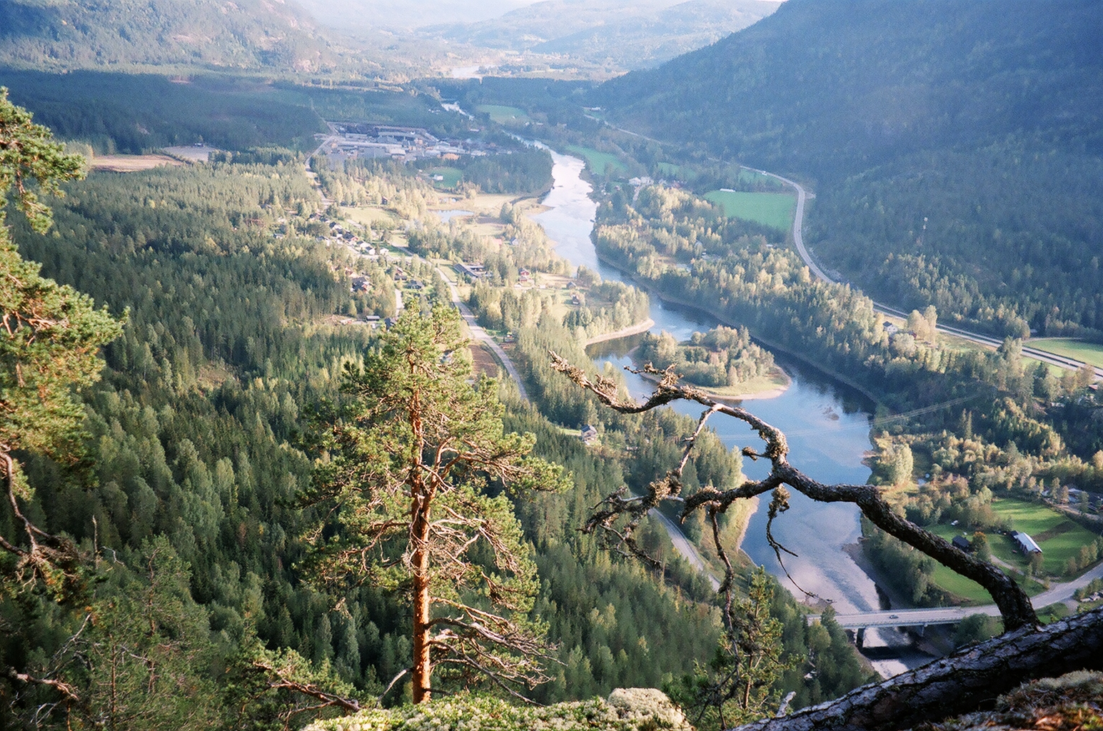 Begna